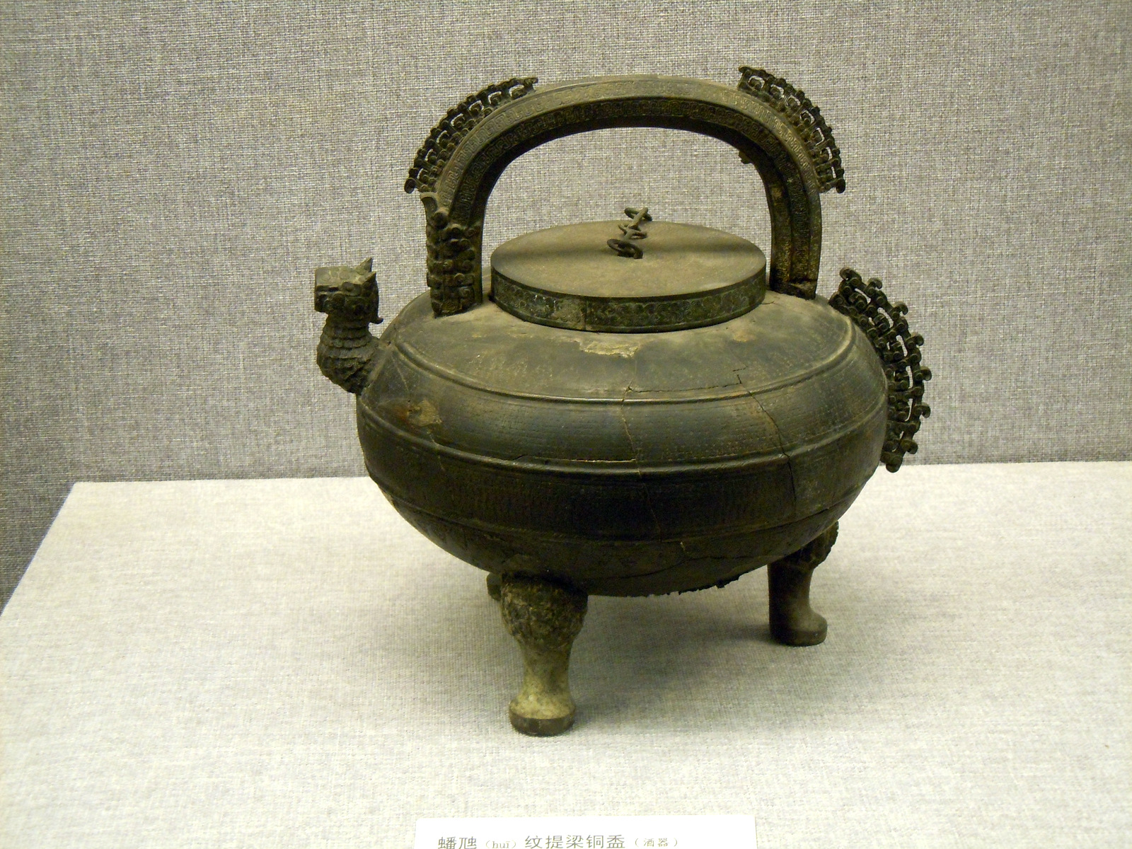 出土于河南省固始县侯古堆一号墓的蟠虺纹提梁铜盉